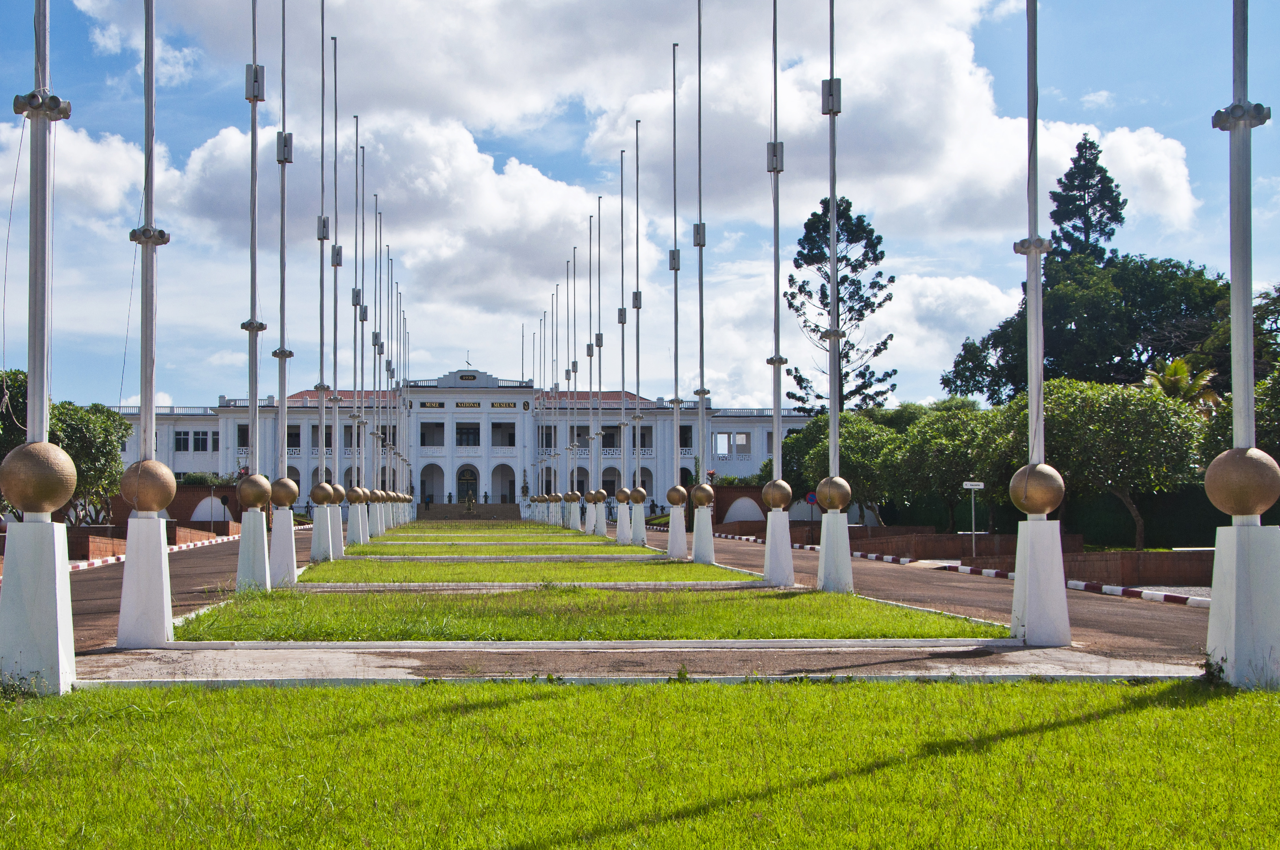 Musée National du Cameroun, Vue principale (Yaoundé)